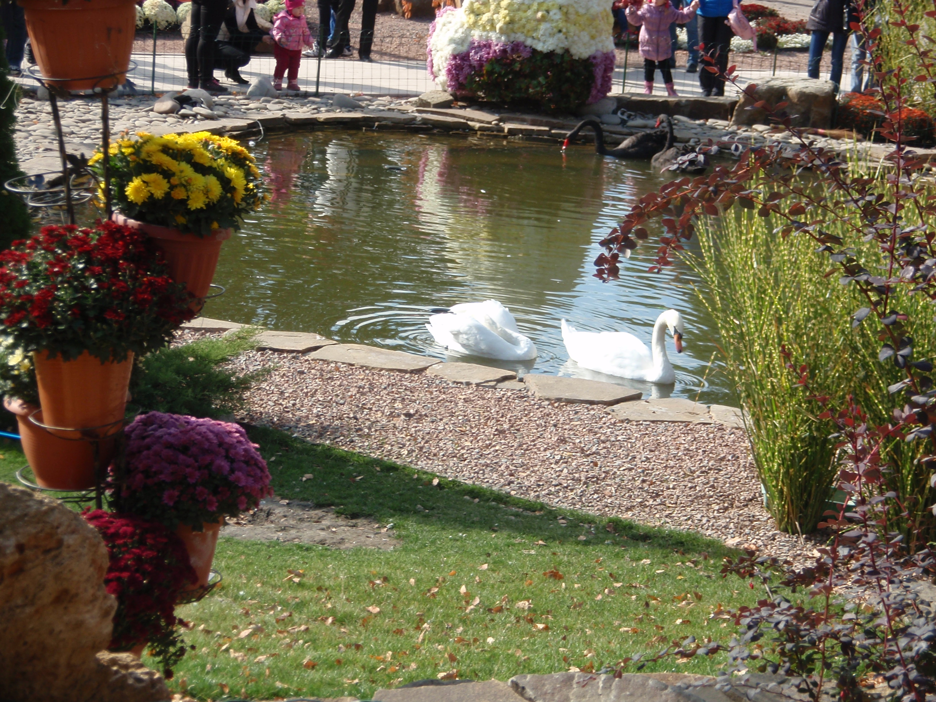 «Фельдман-Екопарк», Дергачівський район, Південне лісництво